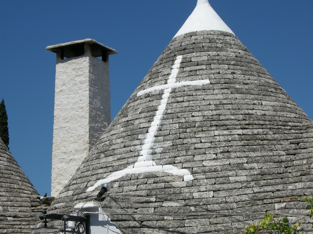 A cross...